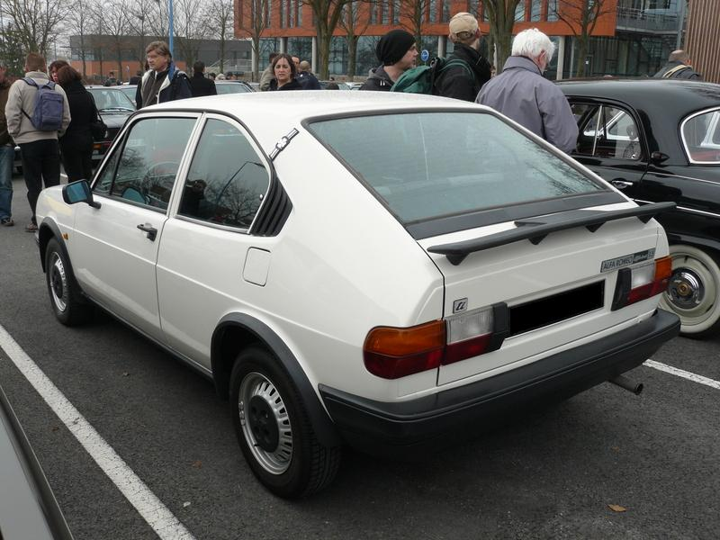 Reims 2012